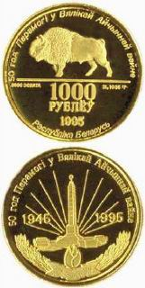 Беларуская (тарашкевіца): Памятная манэта да 50-годзьдзя Перамогі ў Вялікай Айчыннай Вайне